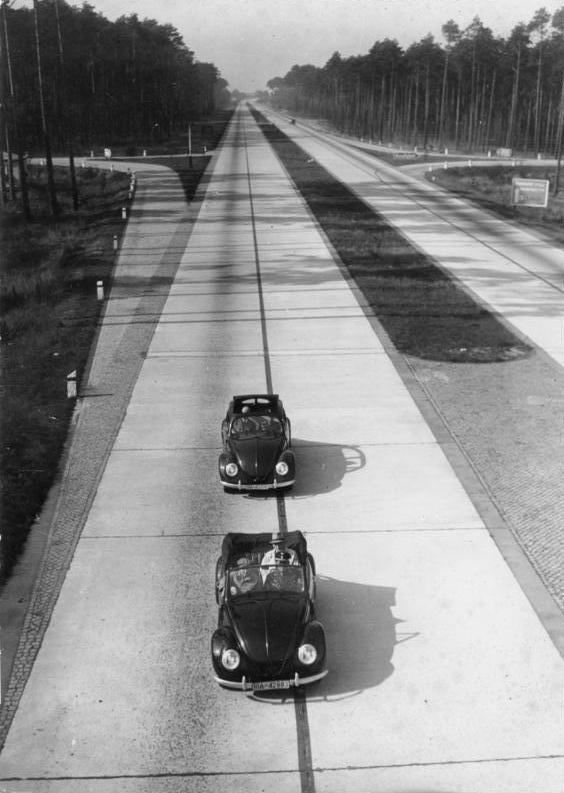 This description has been identified as biased or incorrect: Propaganda240a/Zum 30. Januar 1943 - 10 Jahre nationalsozialistische Aufbauarbeit UBz: Blick auf eine Autobahn, auf der eine andere Errungenschaft des Nationalsozialismus, der deutsche Volkswagen, fährt. Atlantic, 19.1.43 /C. /Scha. E.M. Information added by Wikimedia users.Interpretation: Zentralperspektive auf die zum Bildbetrachter führende Richtungsfahrbahn. Fahrbahnplatten aus hellem Beton, Motoröl-Tropfenspur nur auf den rechten Fahrstreifen, befahrbarer Mittel-Trennstreifen und Trennstreifen an der Einfahrteinmündung aus Kleinpflaster, breiter Randpflock mit schräger Oberkante am spitzen Ende der Einfahrteinmündung. Beide Wagen stehen in geringem Längsabstand demonstrativ fast mittig der Richtungsfahrbahn, die linke Schulter der Fahrer über der Fahrstreifentrennlinie. Breite einer Fahrspur = 2,4 mal Breite KdF-W (1620 – 100 mm) = 1,52 m = 3,65 m – 5 % Fehler = mind. 3,46 m.